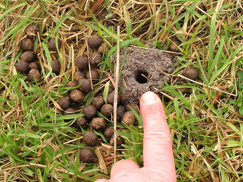 Eingang zur Brutkammer des Stierkäfers (Typhoeus typhoeus) mit Schafkot in direkter Nachbarschaft